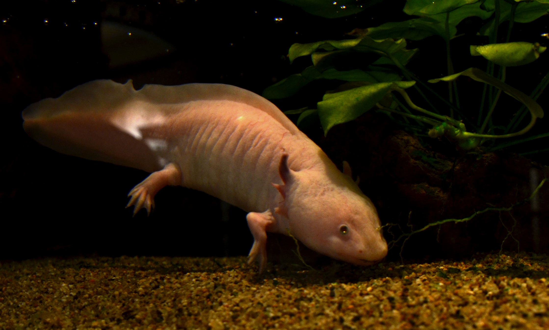 Axolotl (Ambystoma mexicanum), au Musée d'Histoire Naturelle de Lille.